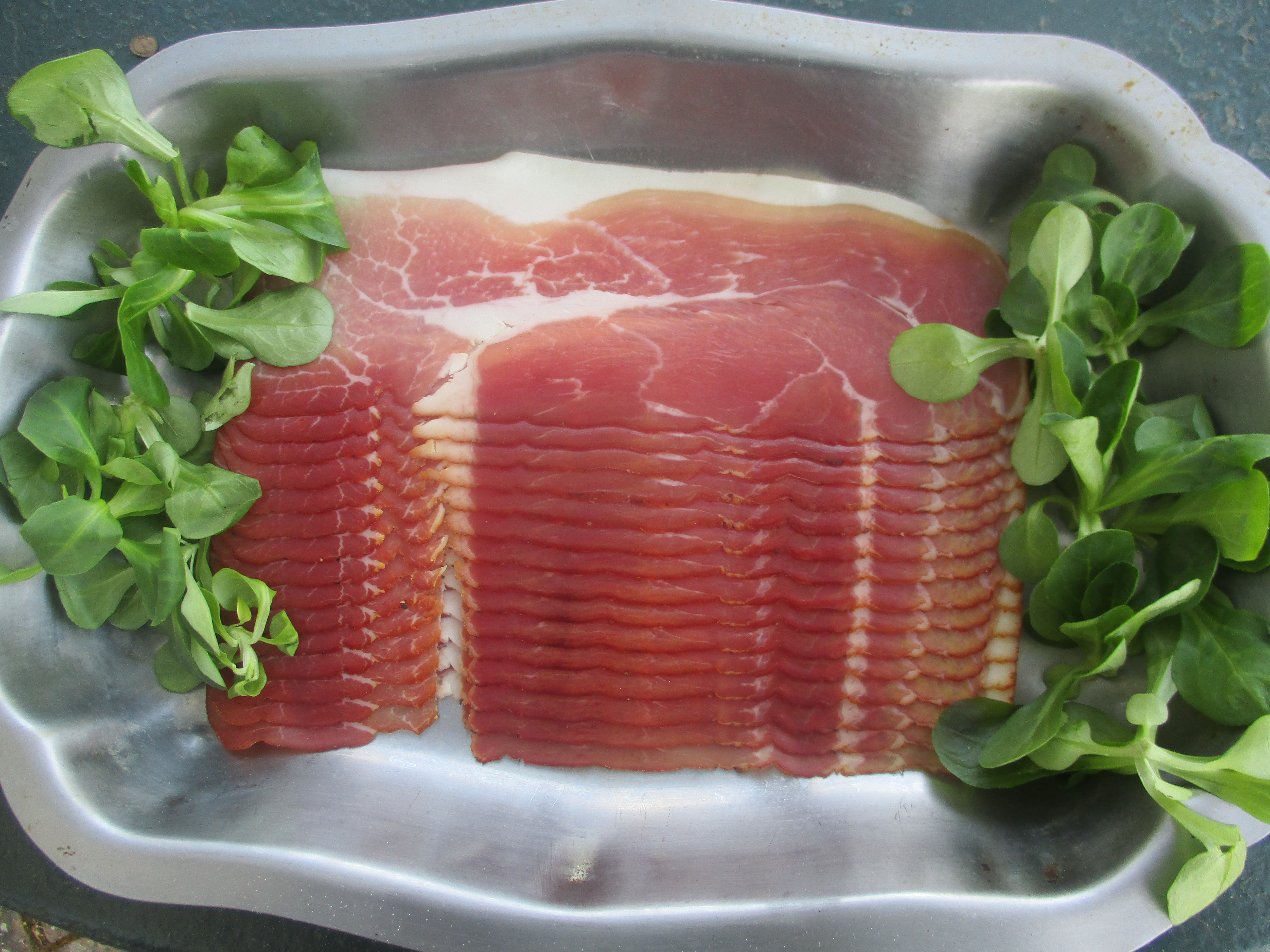 Jambon fumé de Forêt Noire. Schwarzwälder Schinken.